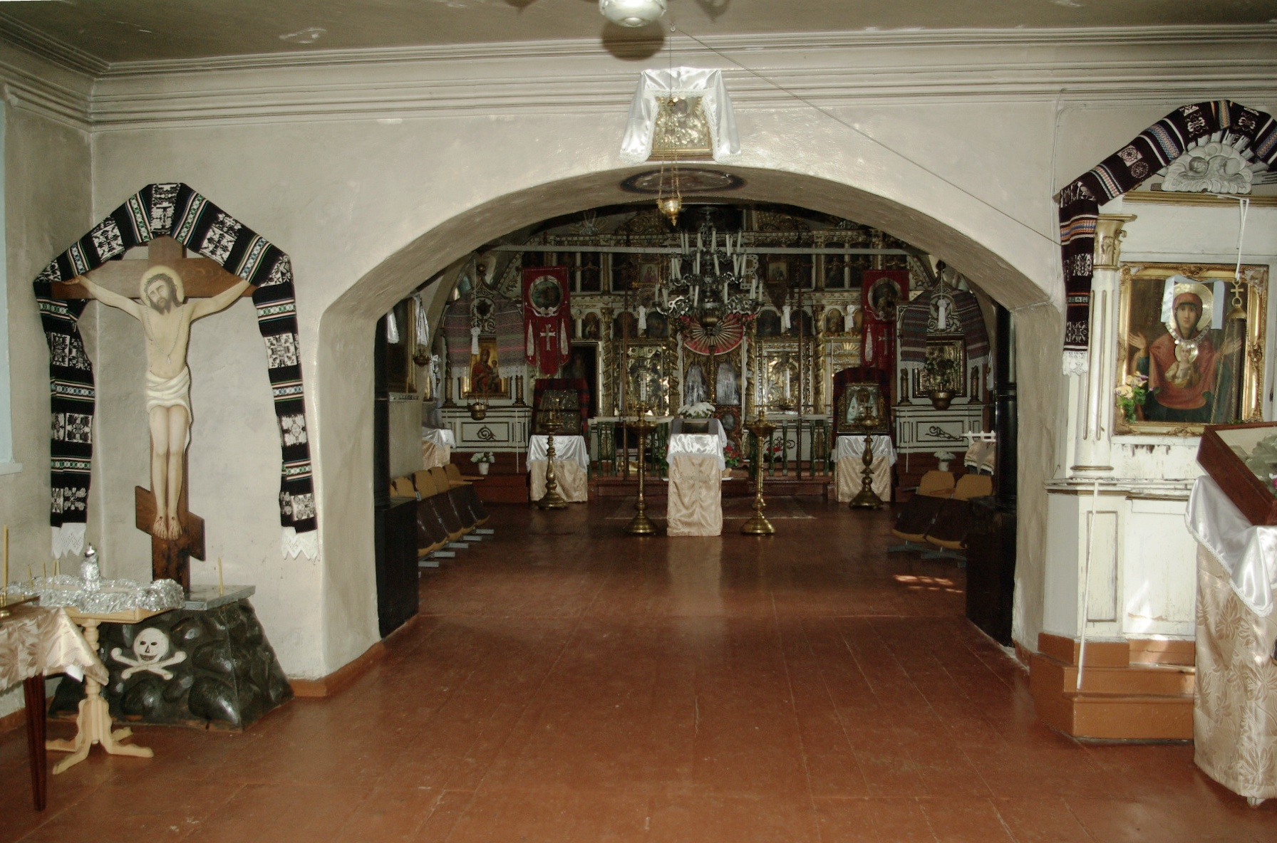 Saatse Püha Paraskeva kiriku interjöör